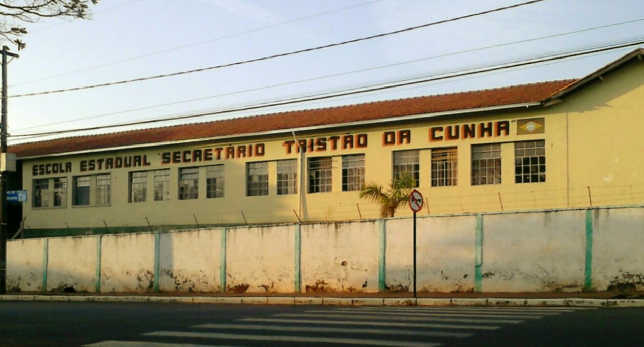 Escola Estadual Secretario Tristão da Cunha em Divisa Nova.